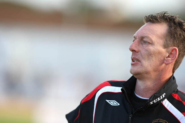 Alan McDonald Glentoran Manager